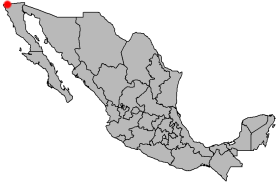 Locatie van Tijuana